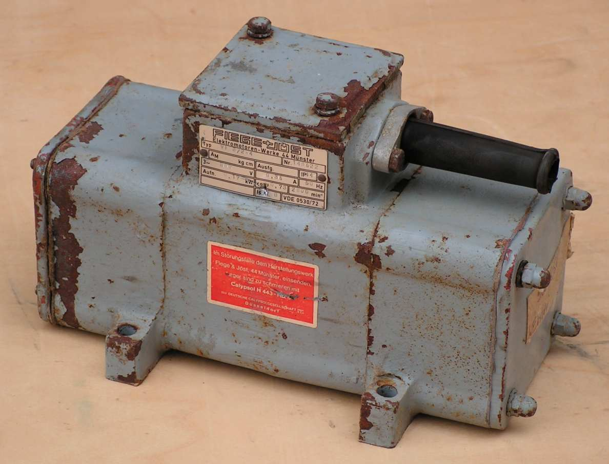 Unwuchtmotor Gesamtansicht